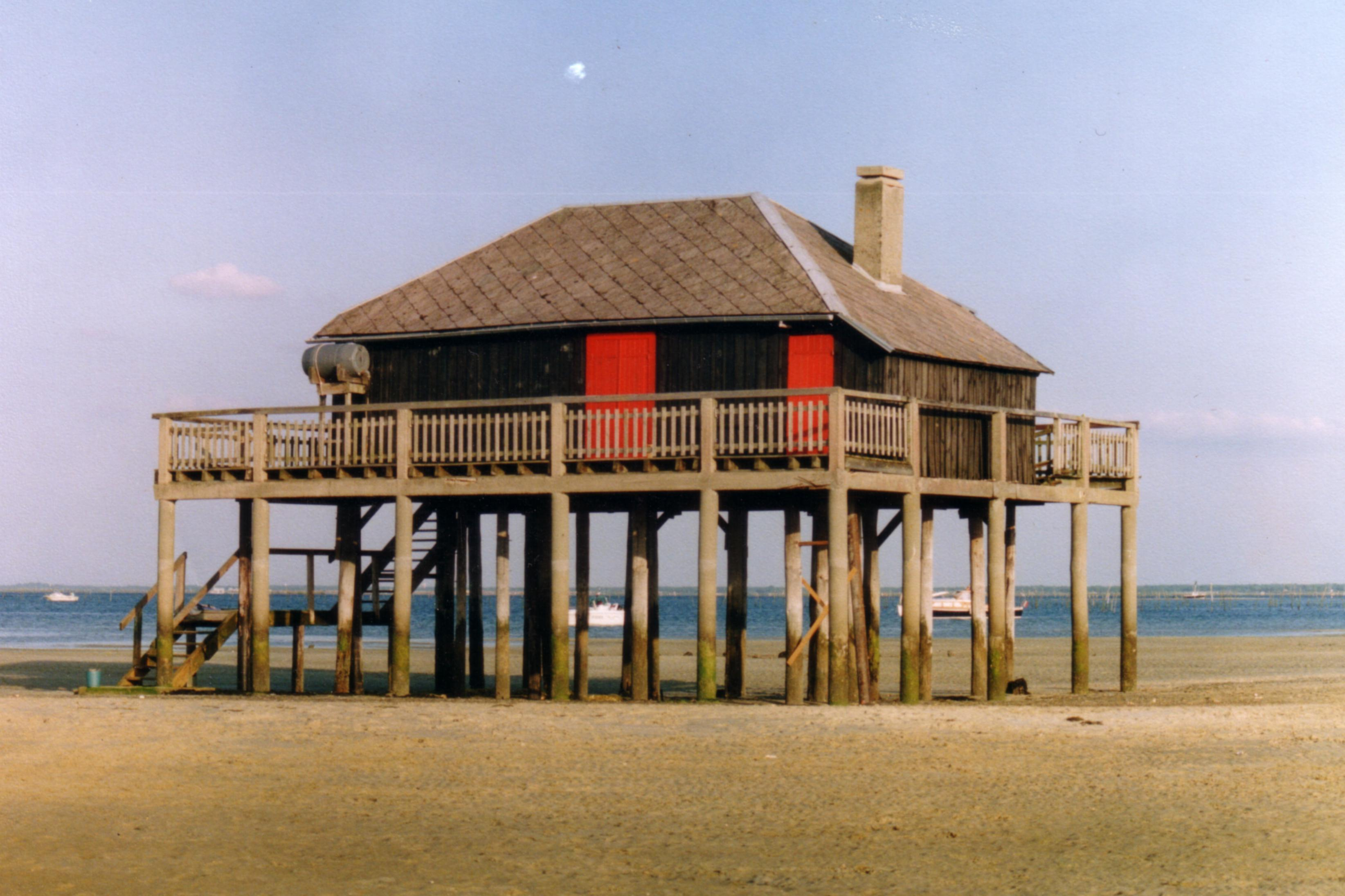 cabanes tchanquée du bassin d'arcachon